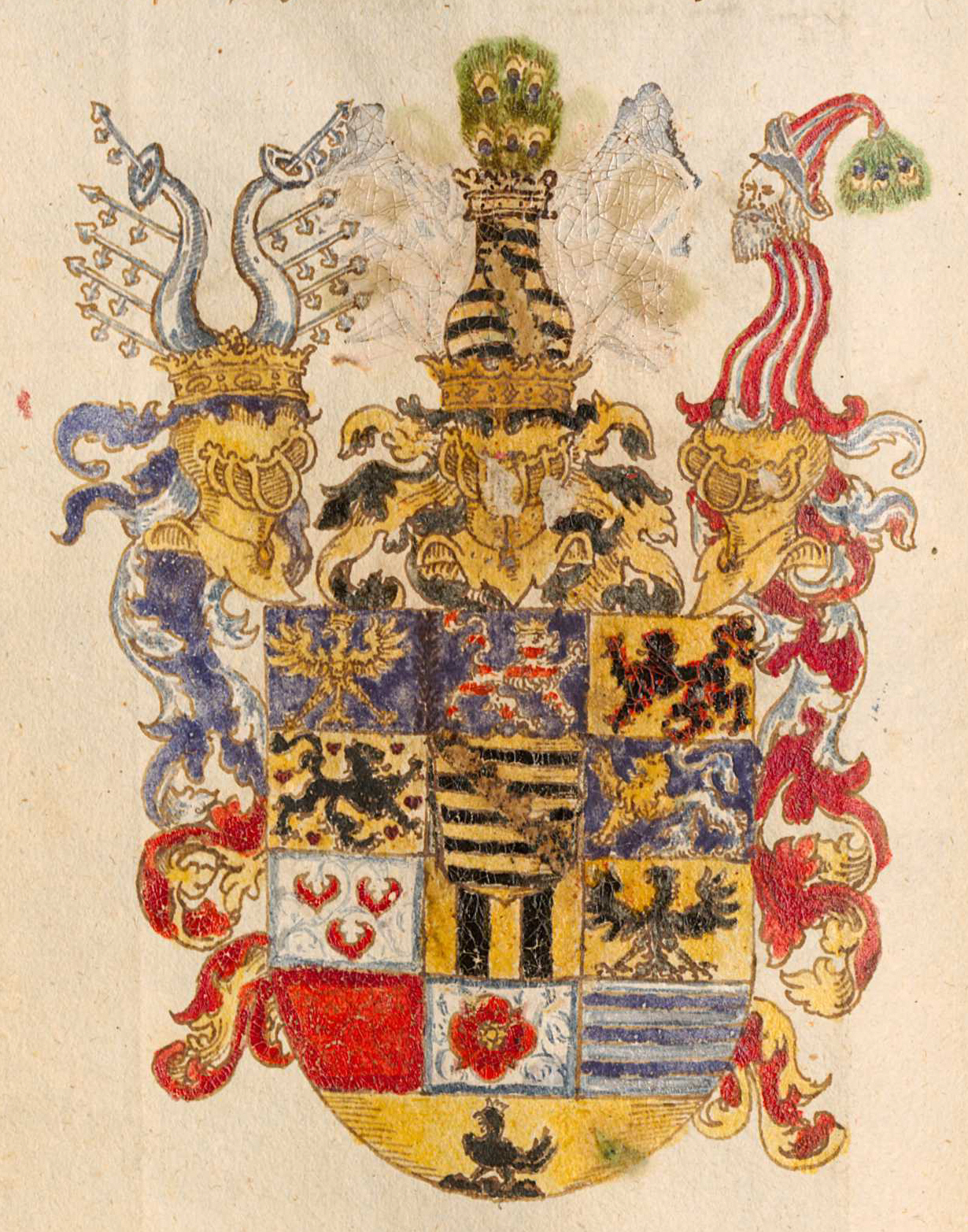 Wappen Friedrich Wilhelm I. von Sachsen-Weimar, 1591–1601 auch Regent von Kursachsen